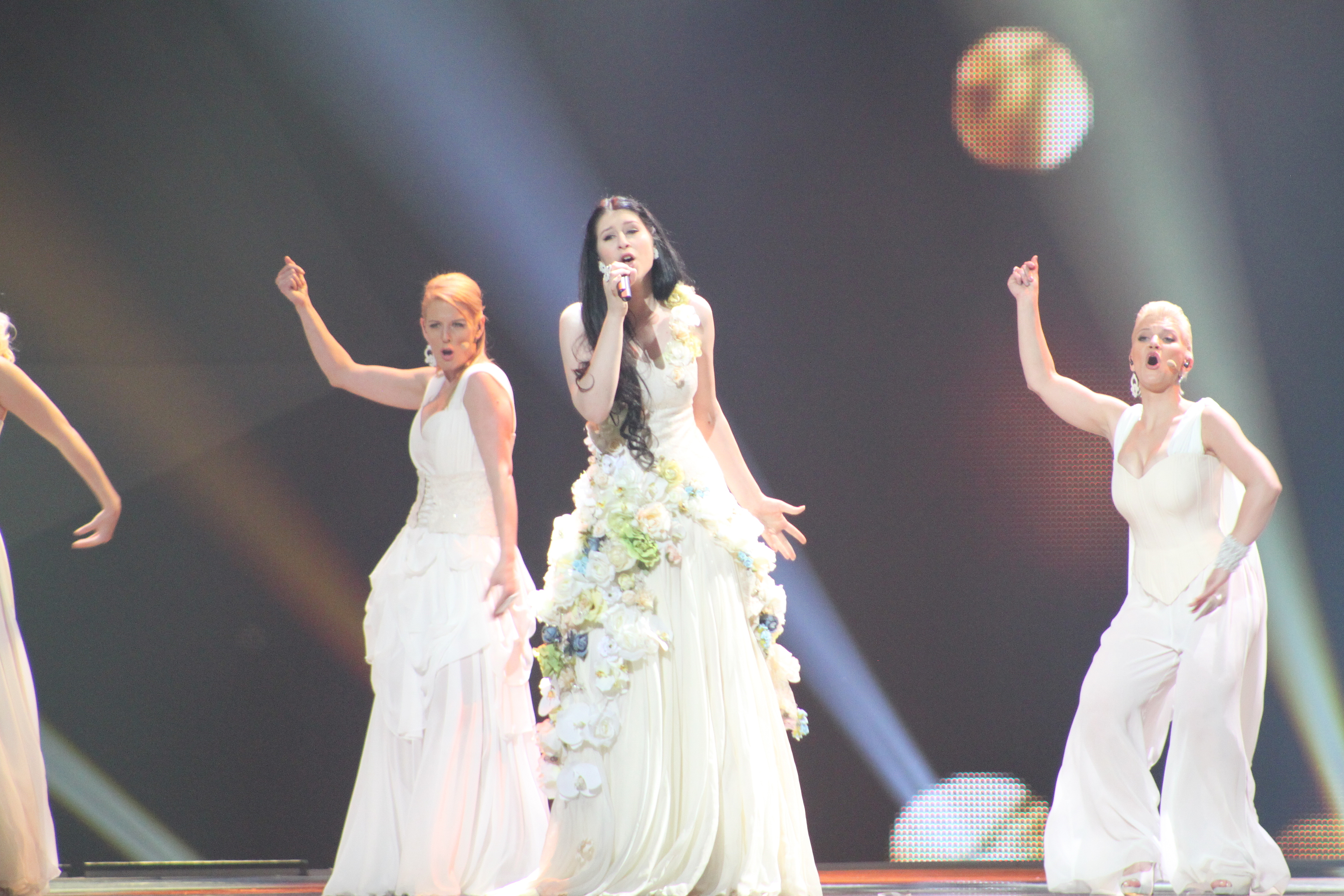 Представительница Словении Эва Бото.